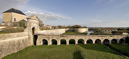 Porte des Campani, fossé, bastion, corps de garde à Saint-Martin-de-Ré - île de Ré Photo issue de ma banque d'images personnelle : Pep.per 22 mars 2006 à 23:39 (CET)